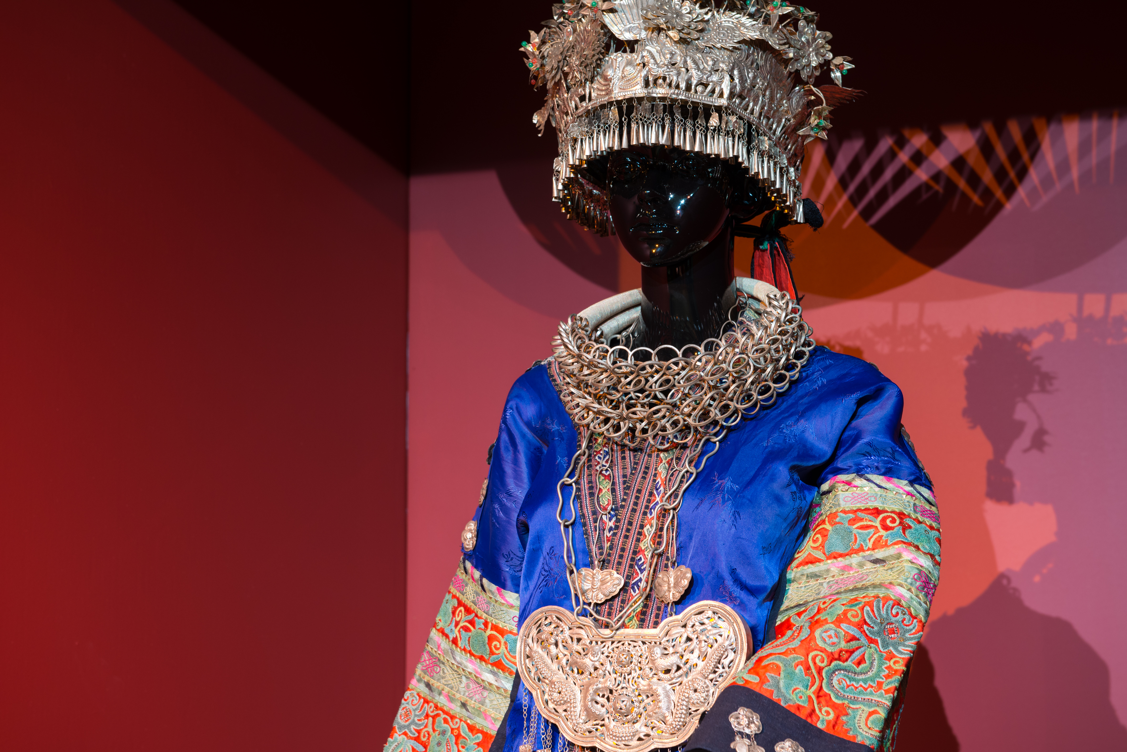 Выставка "Одежды из радуги и серебра"